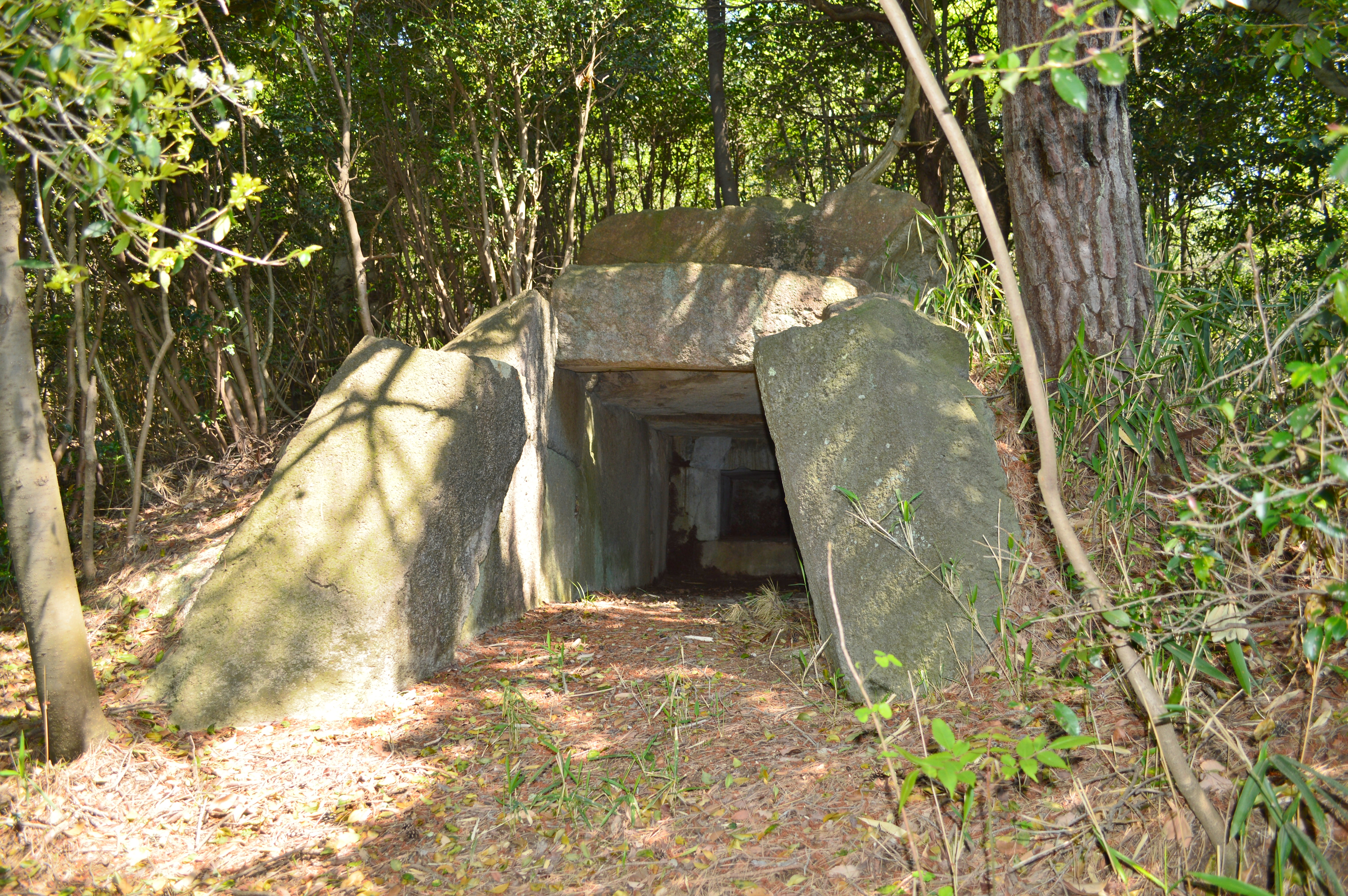 オーコ8号墳 石槨開口部